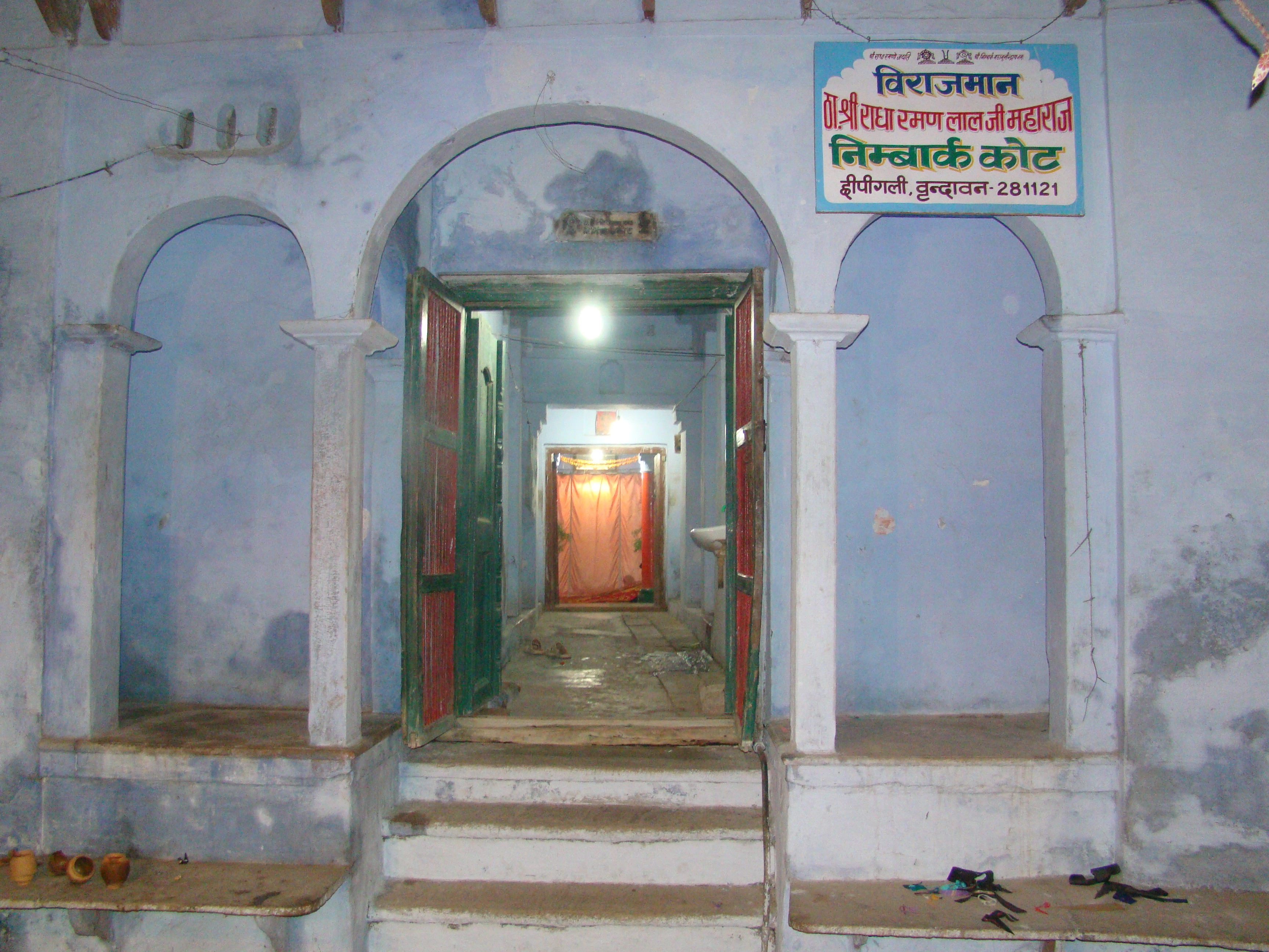 निम्बार्क कोट, वृंदावन का मुख्य दरवाजा